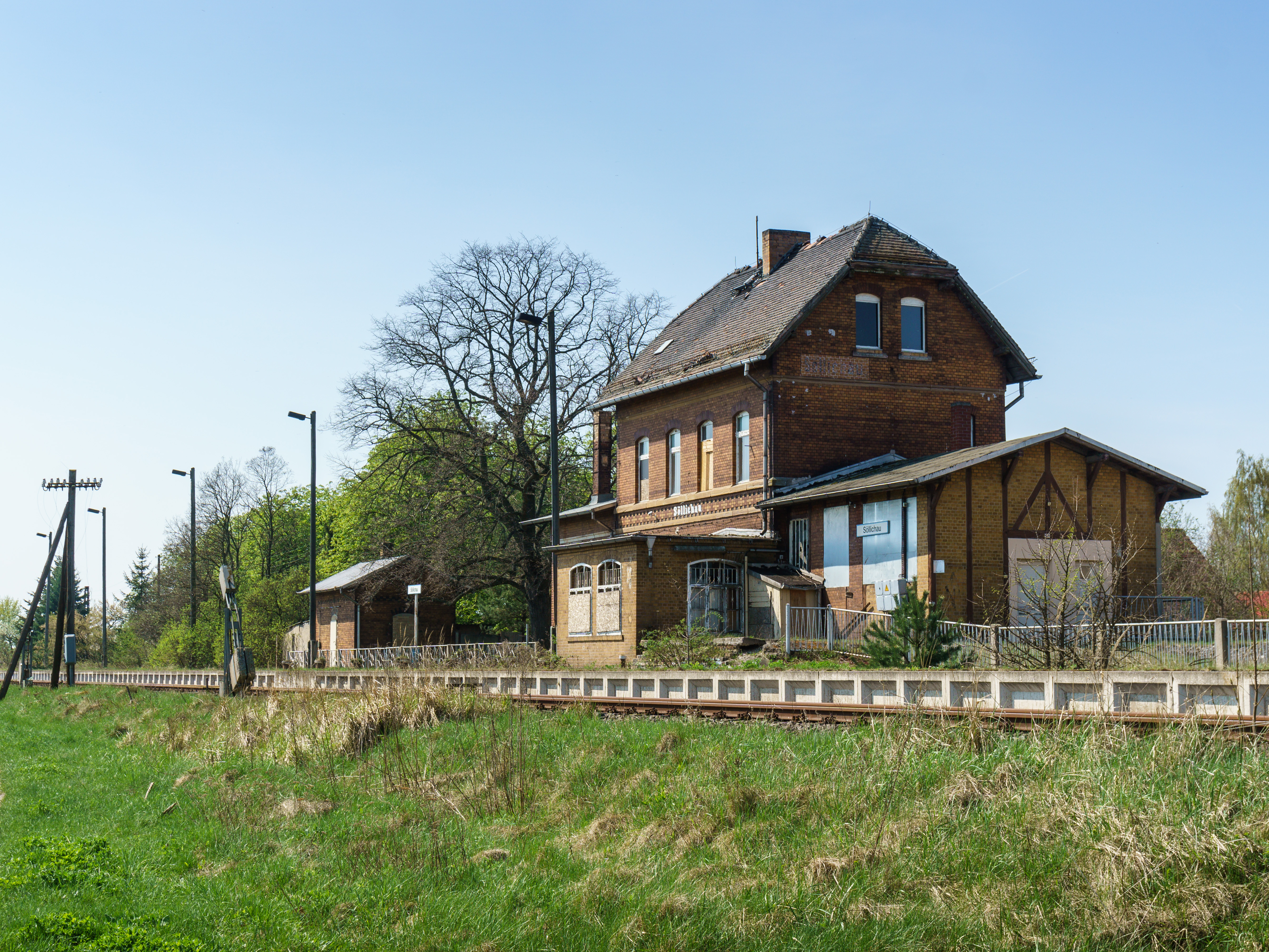 Bahnhof der Strecke Eilenburg-Wittenberg, Bahnhofstraße 11 in Bad Schmiedeberg OT Söllichau